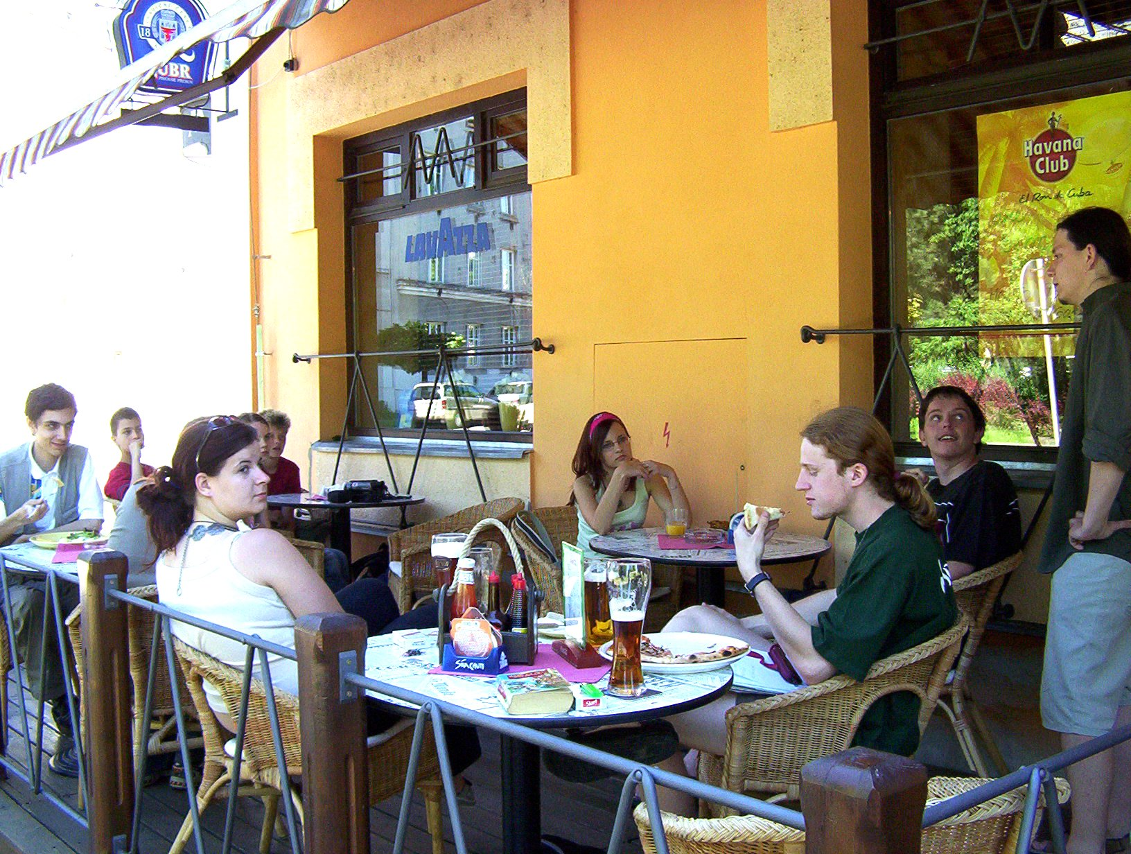 Sraz přátel a hráčů internetové hry v Prerove 2005.